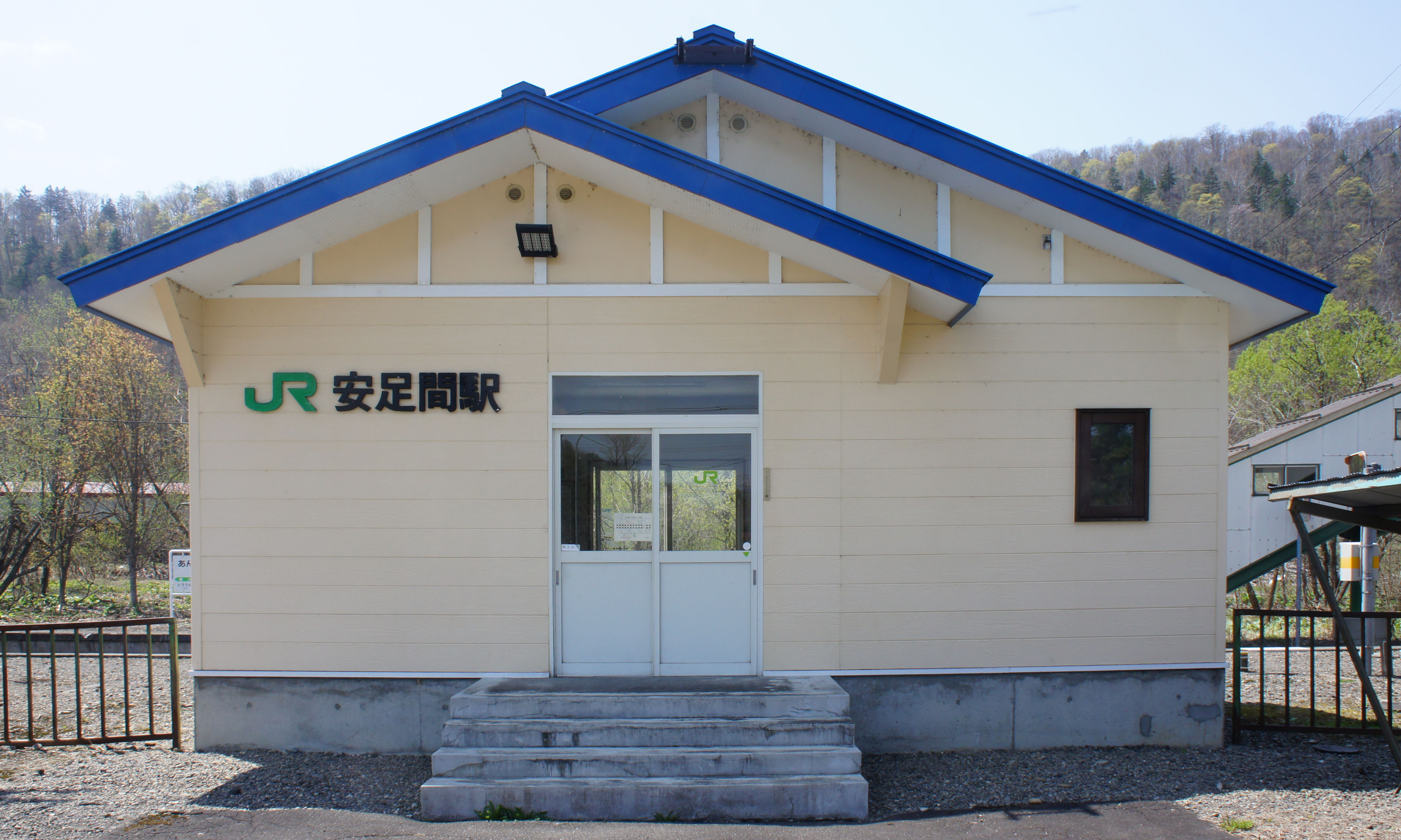 JR石北本線・安足間駅の駅舎